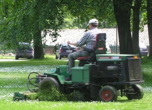 Aufsitzrasenmäher in Aktion